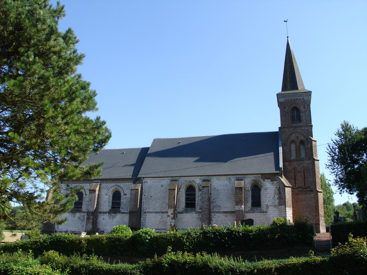 Église de Radinghem